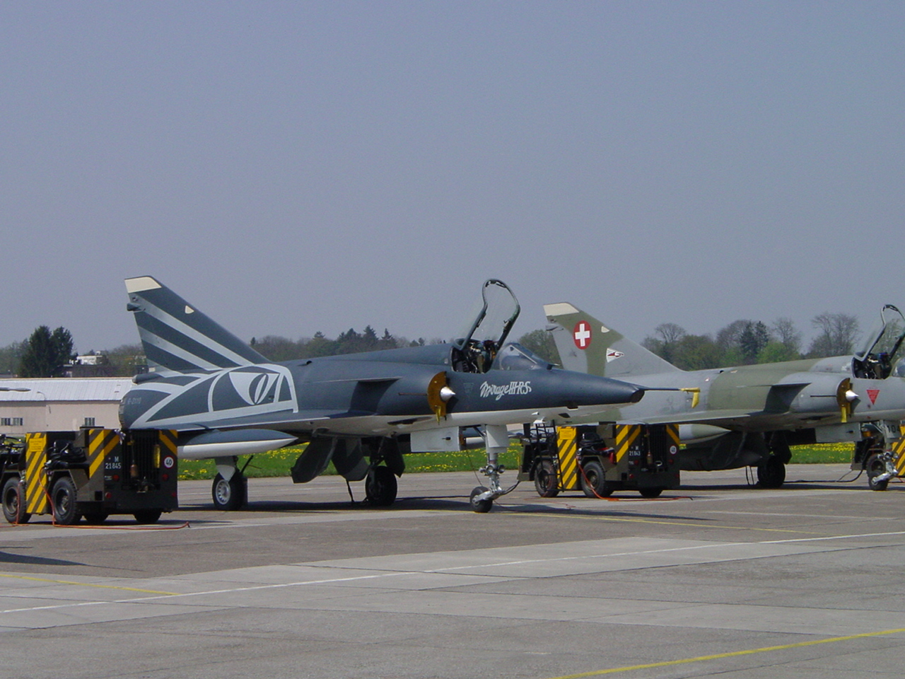 Black